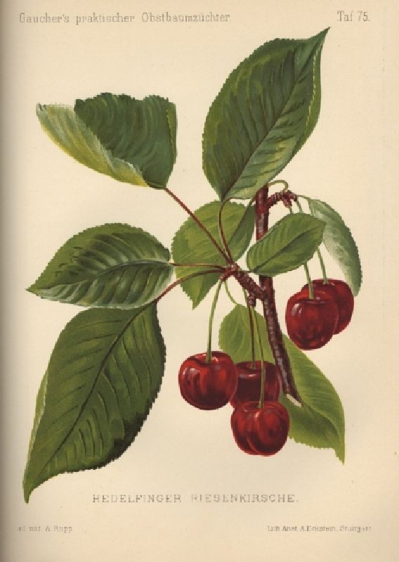 Hedelfinger Riesenkirsche. 1889 Gauchers Praktischer Obstbaumzüchter. V. Jahrgang. Illustrirte Zeitschrift zur Hebung und Förderung des Obstbaues und der Obstverwertung.